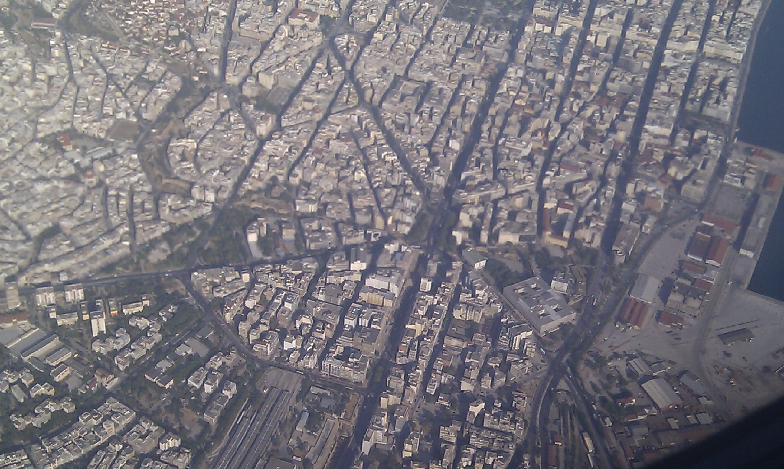 Αεροφωτογραφία Θεσσαλονίκης - Βαρδάρης